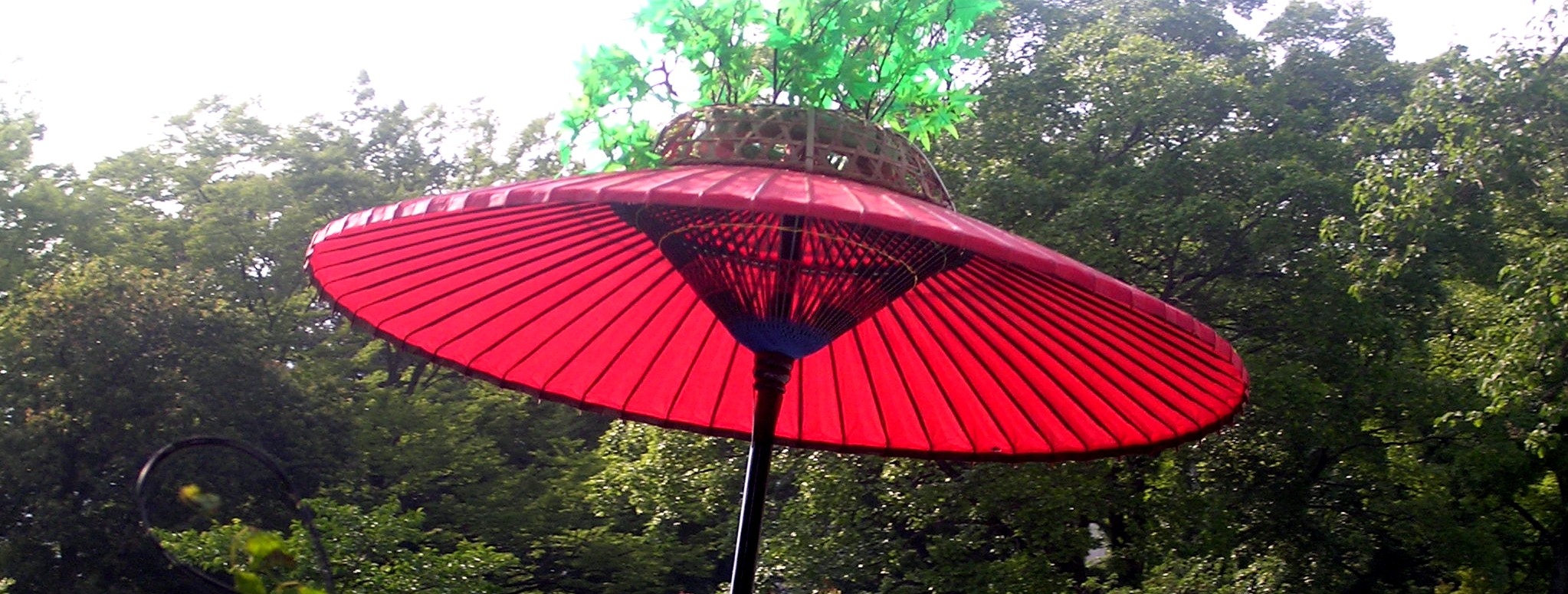 Tradisjonell japansk parasoll, såkalt karakasa, det vil si «kinesisk parasoll». Karaksa er også navn på gamle parasoller og annet som i følge japansk folketro blir besjelet og levende når de blir 100 år gamle.